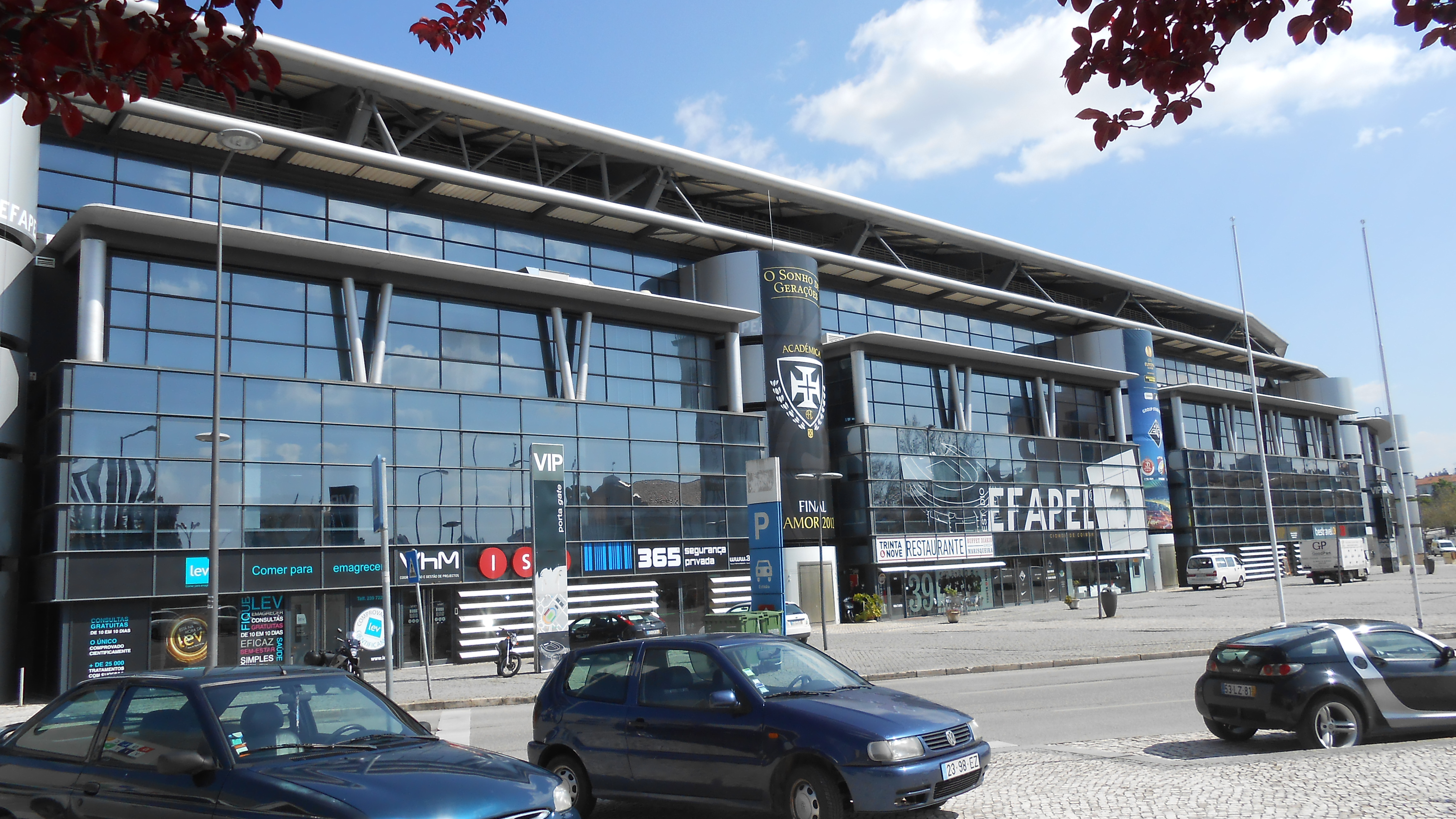 Estádio Cidade de Coimbra